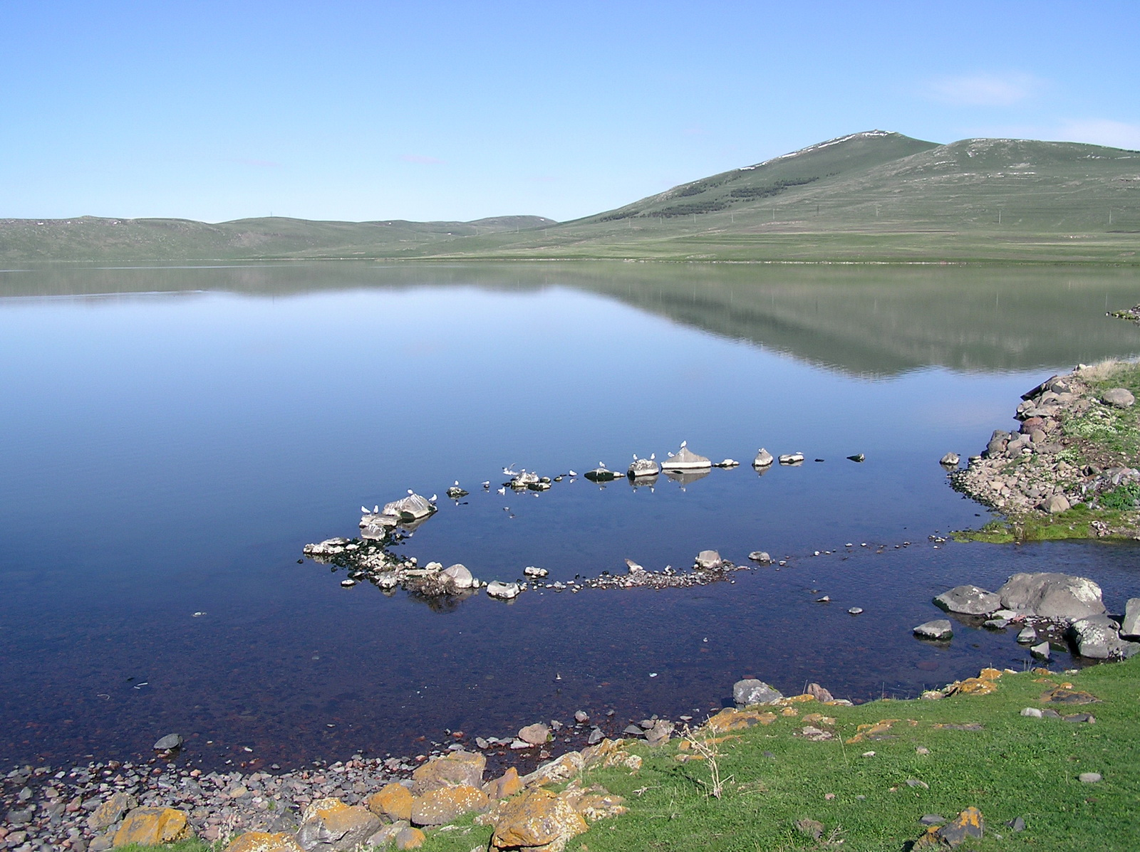 Lac Saghamo